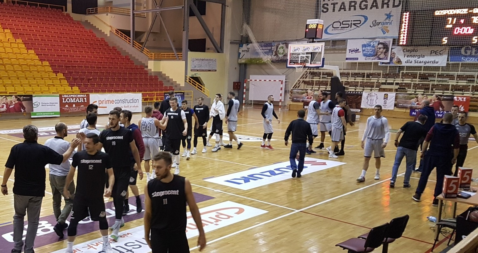 Spójnia-King Szczecin, 01.12.2018